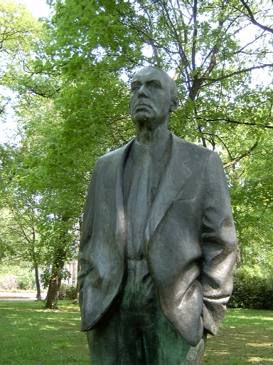 Bronzeskulptur "Johannes R. Becher" von Fritz Cremer (1960), Ausschnitt Standort: Berlin-Pankow, Bürgerpark